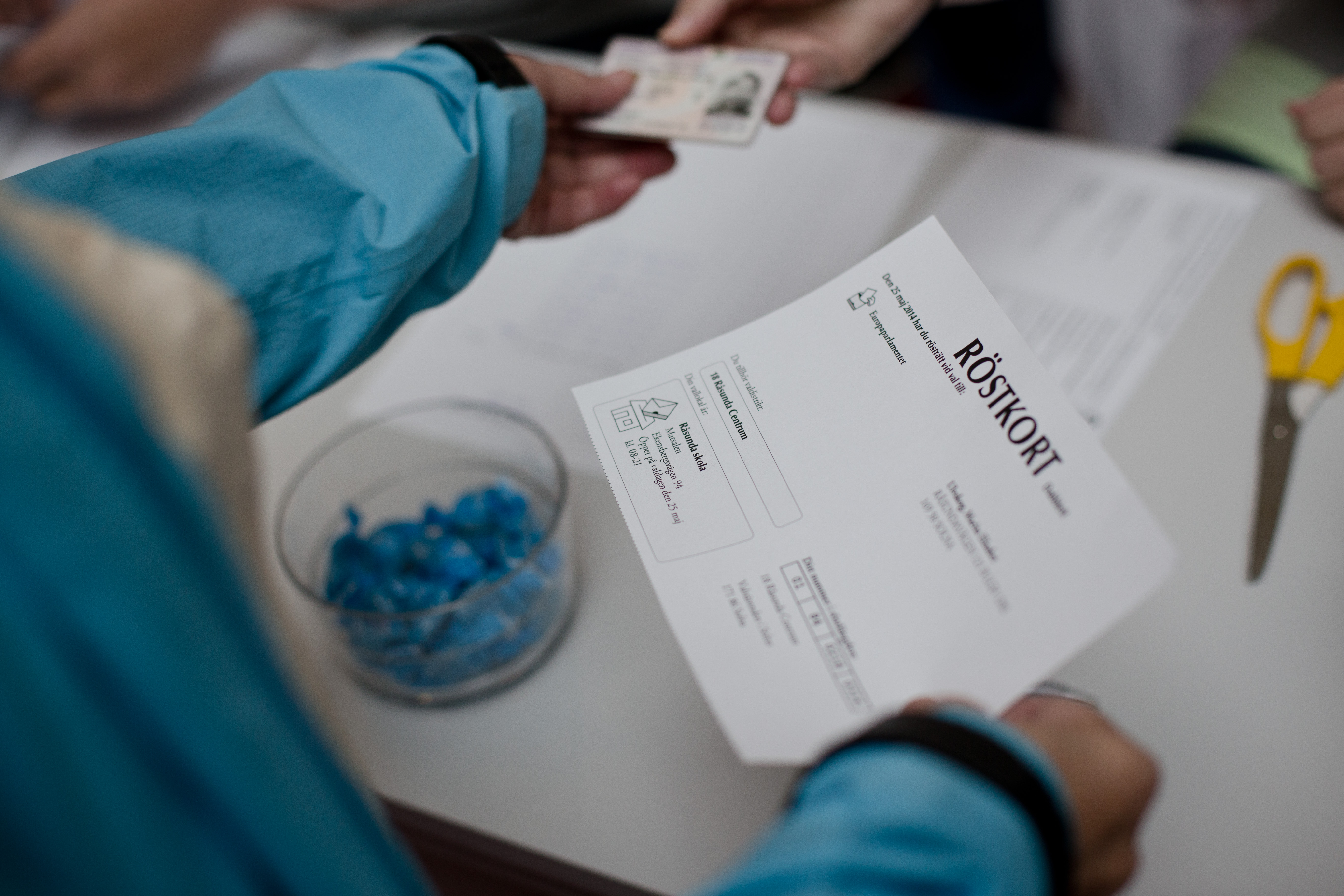 Marita Ulvskog förhandsröstar i EU-parlamentsvalet på Malmö högskola. Foto: Per Wilkens